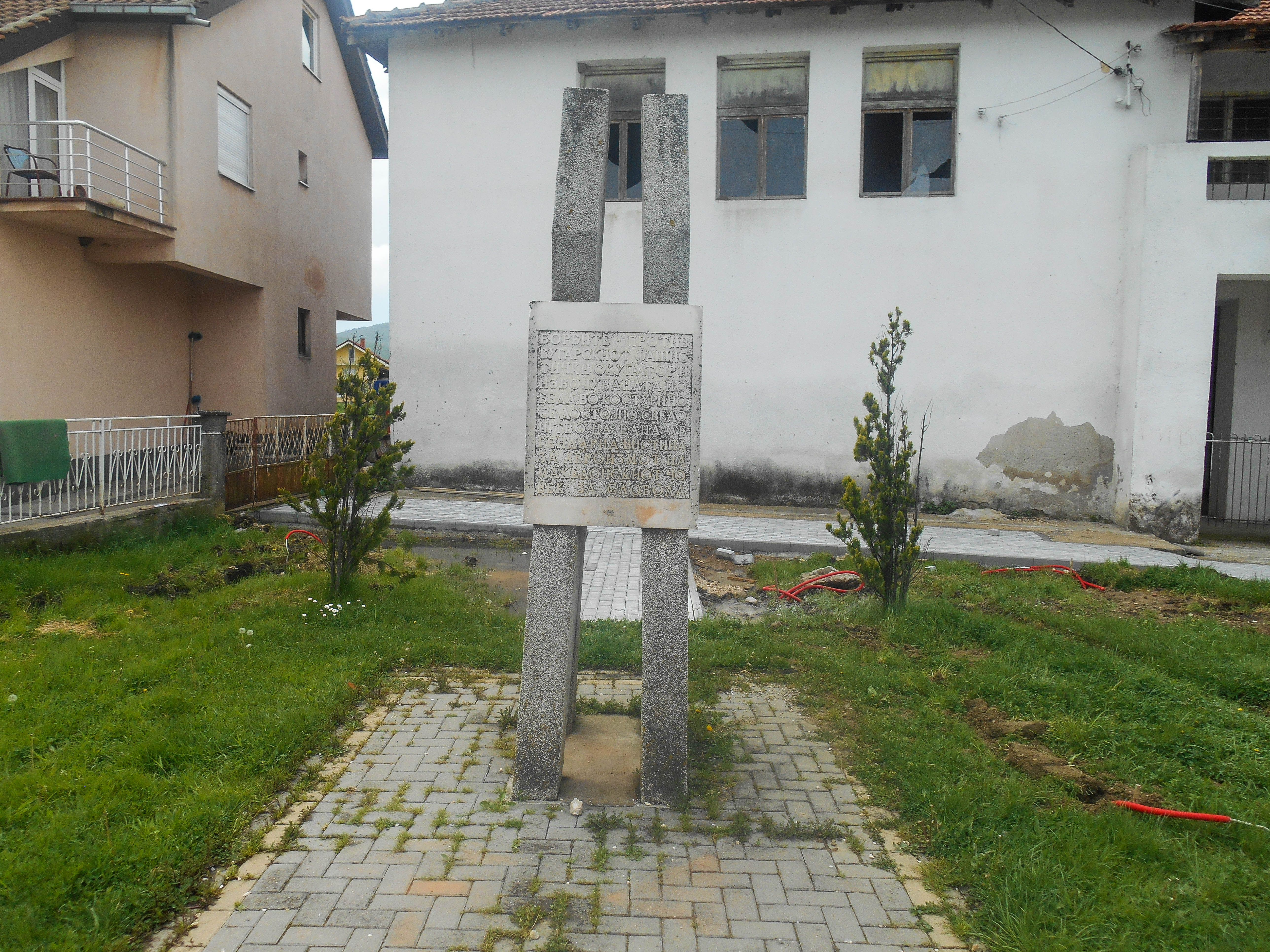 Споменик во Костурино